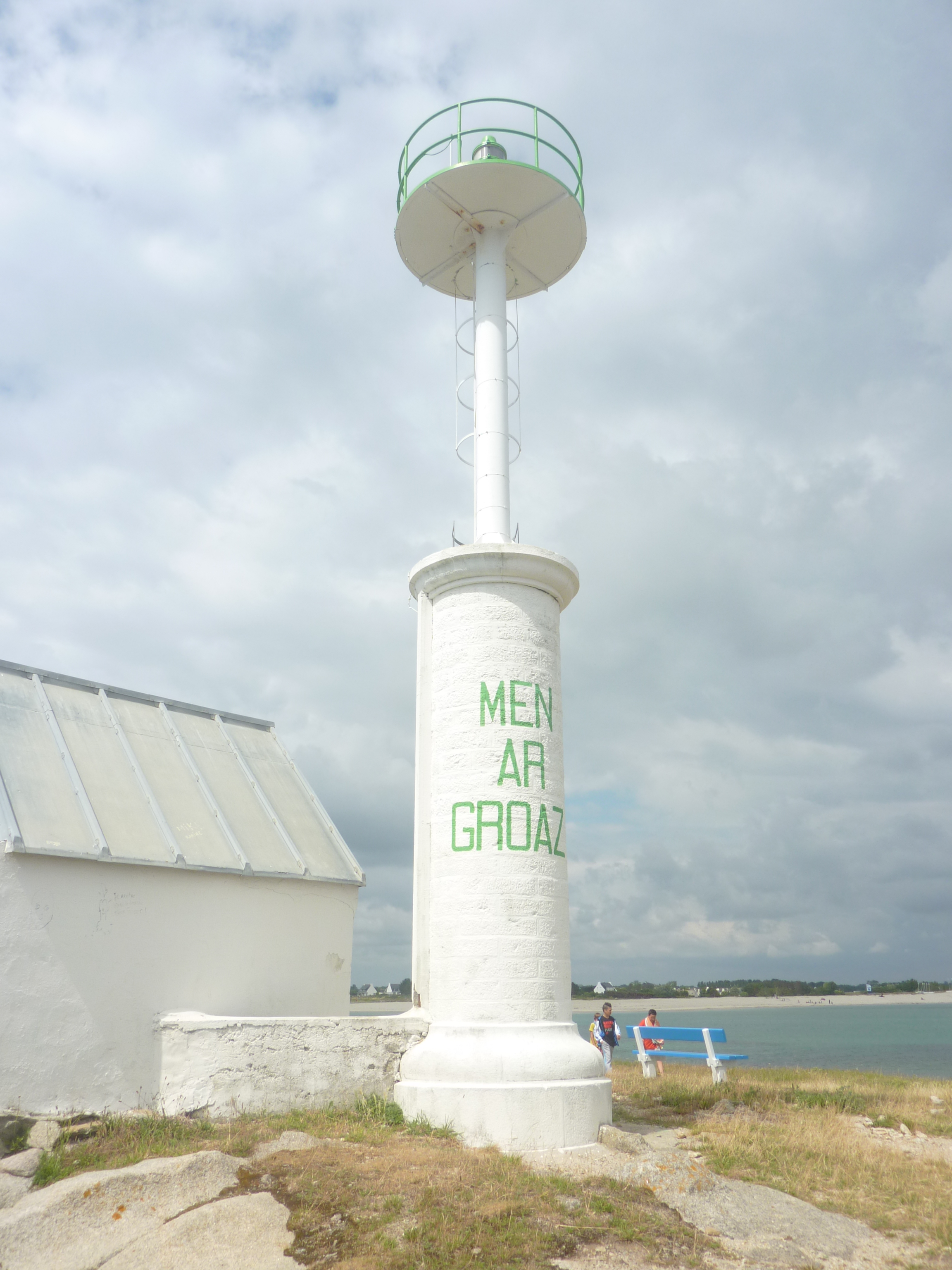 Lesconil : la tourelle de Men ar groaz, à l'emplacement d'un ancien ilôt de marée disparu, englobé désormais dans le terre-plein de la criée protégeant le port